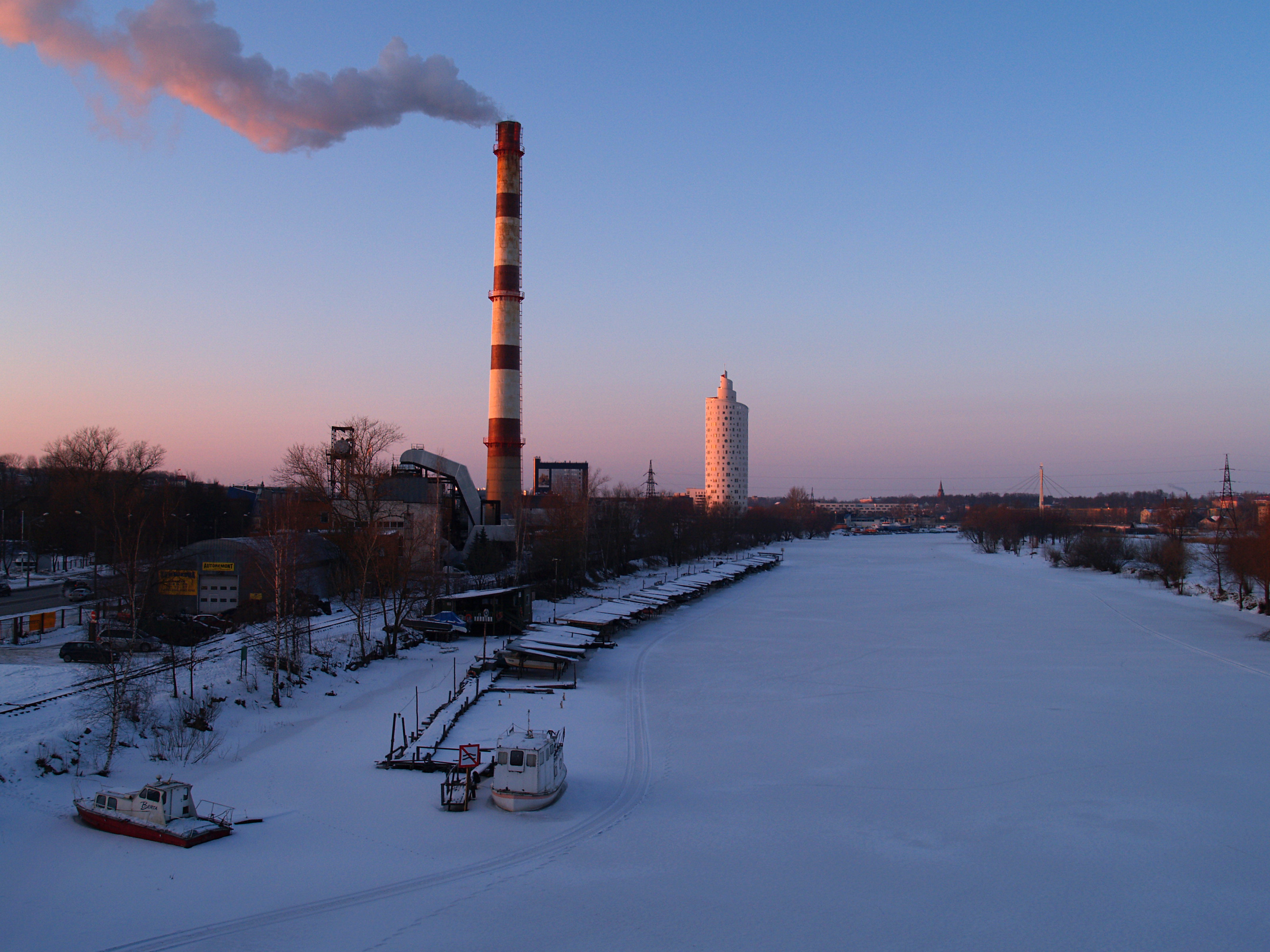 Tartu keskkatlamaja suitsev korsten 2009. aastal vaadatuna Sõpruse sillalt.